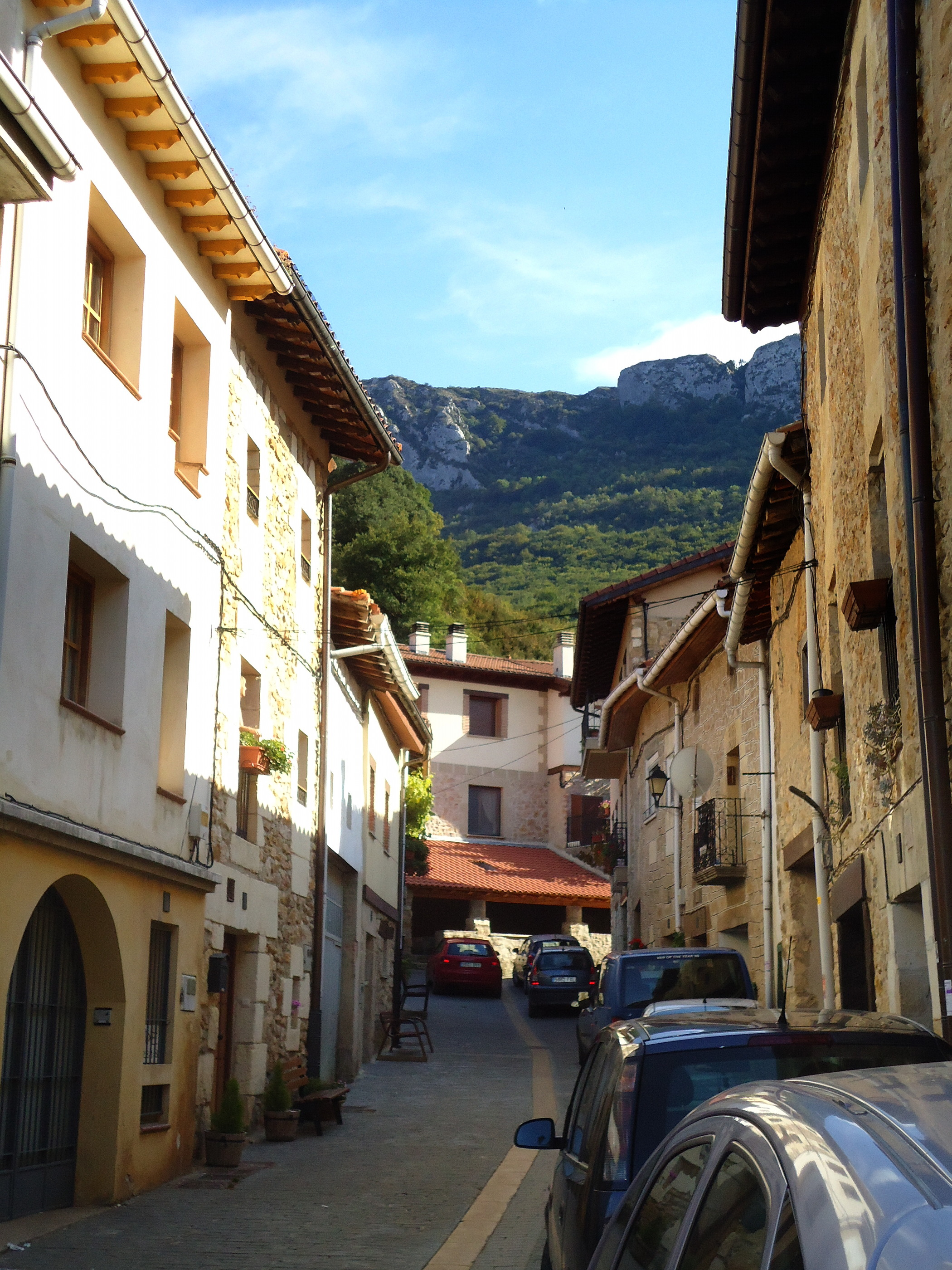 Bernedoko (Araba) kale bat